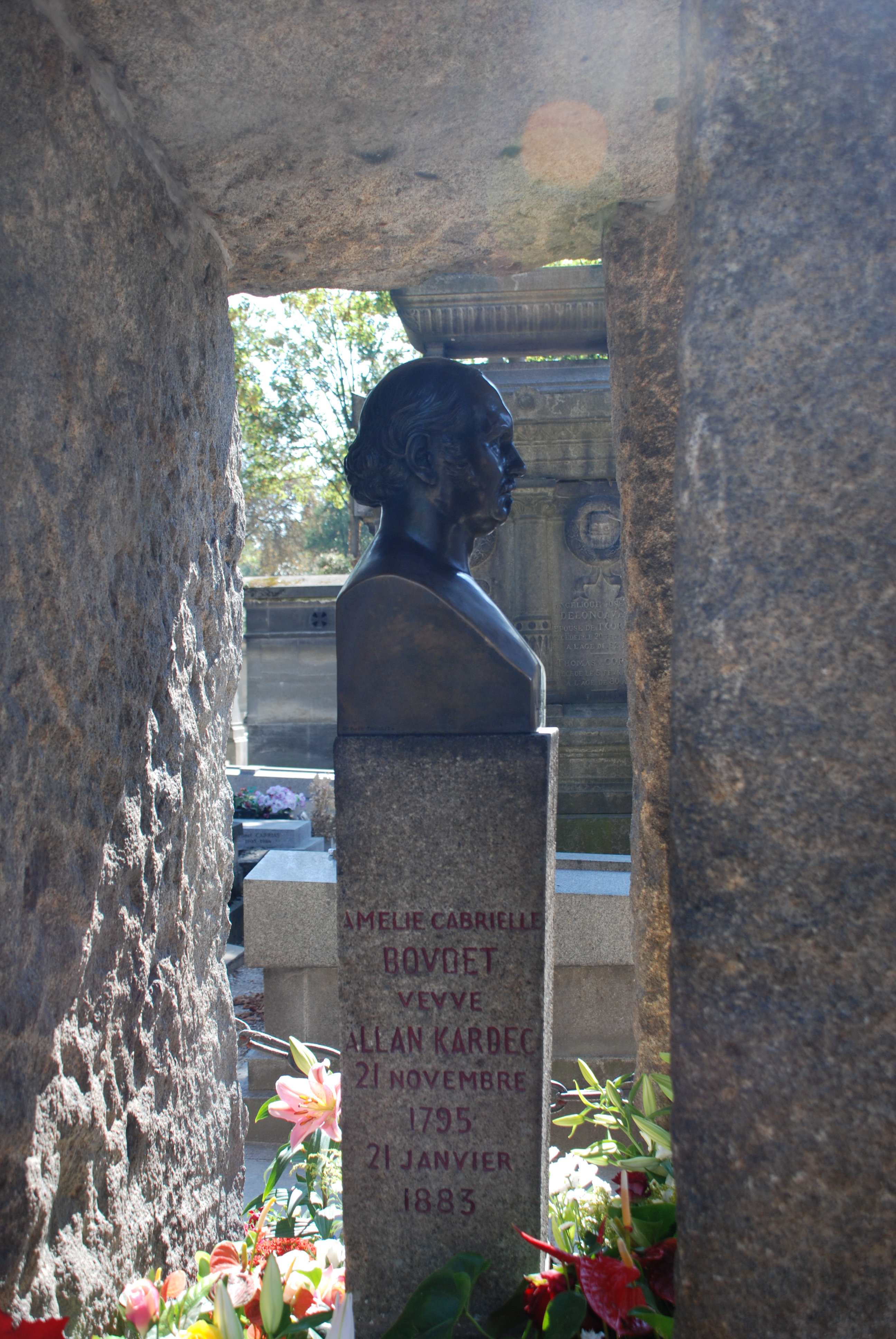 Inscription mentionnant Amelie Boudet sur sa tombe qui est aussi celle d'Allan Kardec, son mari.